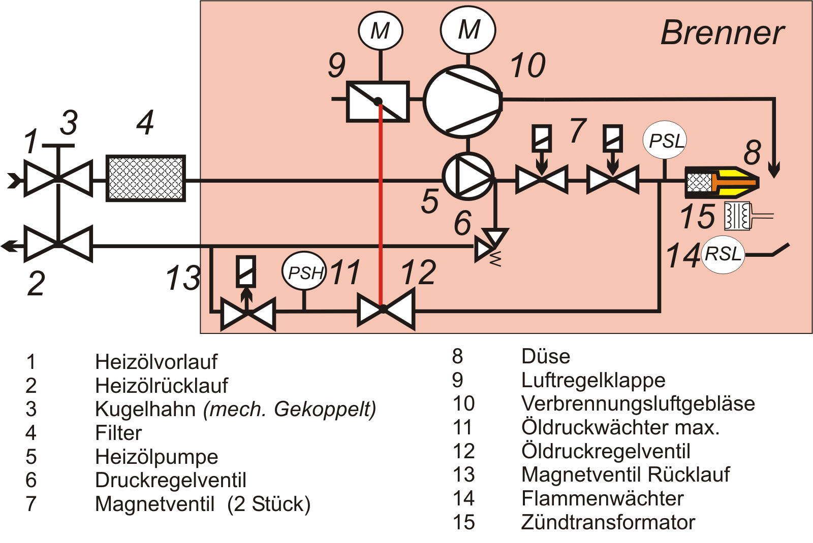 Ölzerstäubungsbrenner mit modulierender Fahrweise